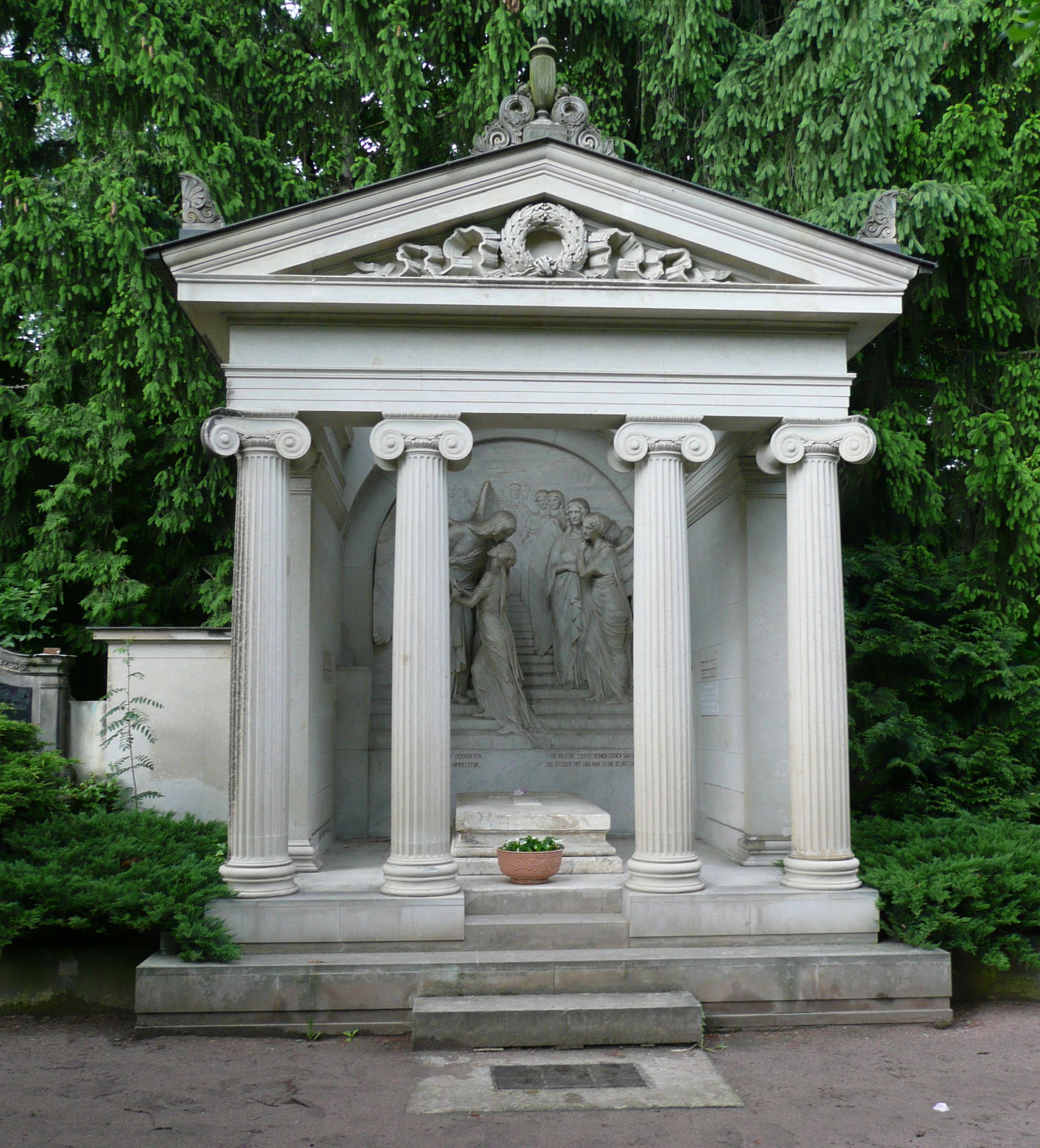 Grabstätte Karl Mays auf dem Friedhof von Radebeul bei Dresden